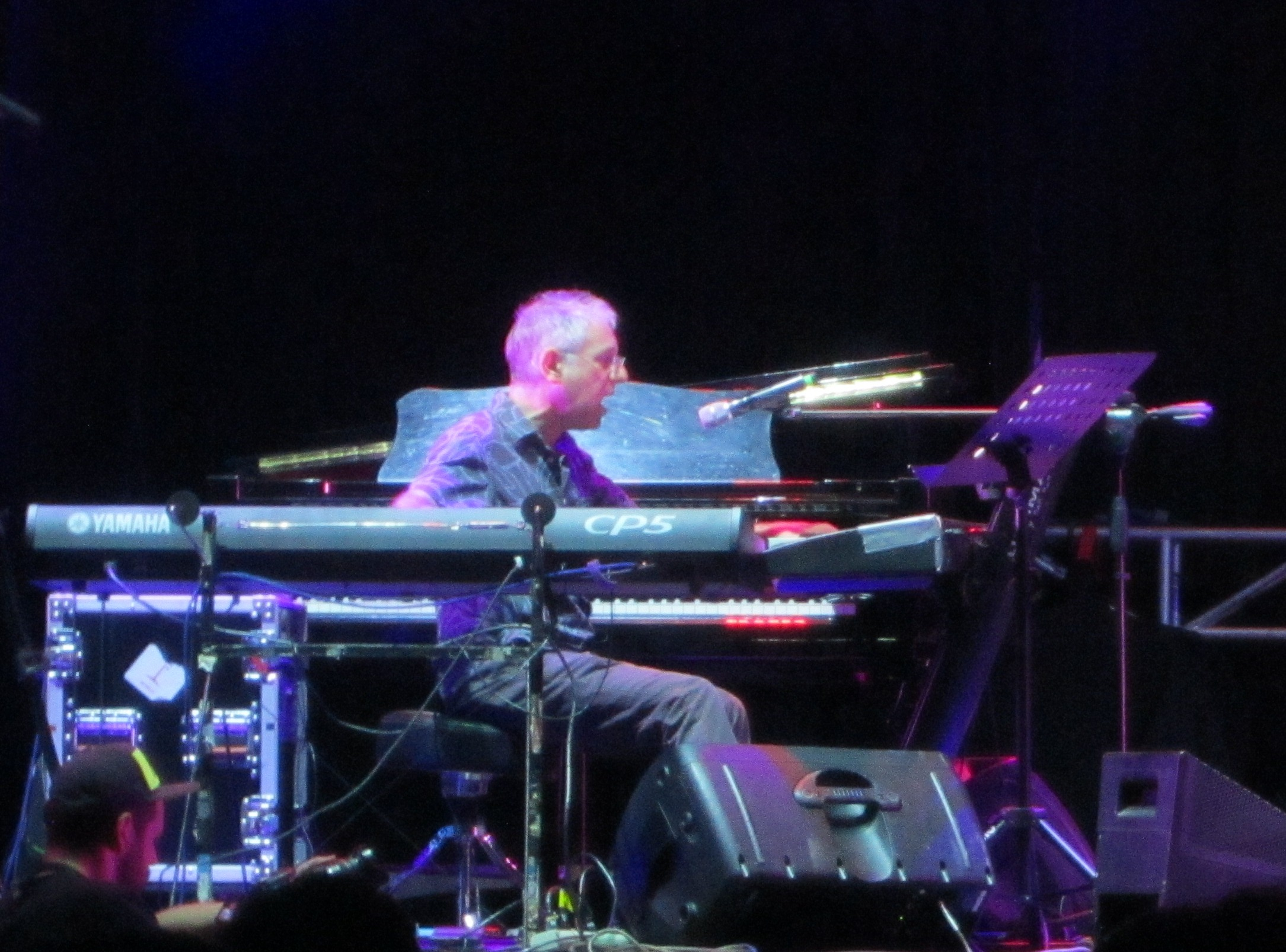 La Marraqueta en el Festival Internacional Providencia Jazz